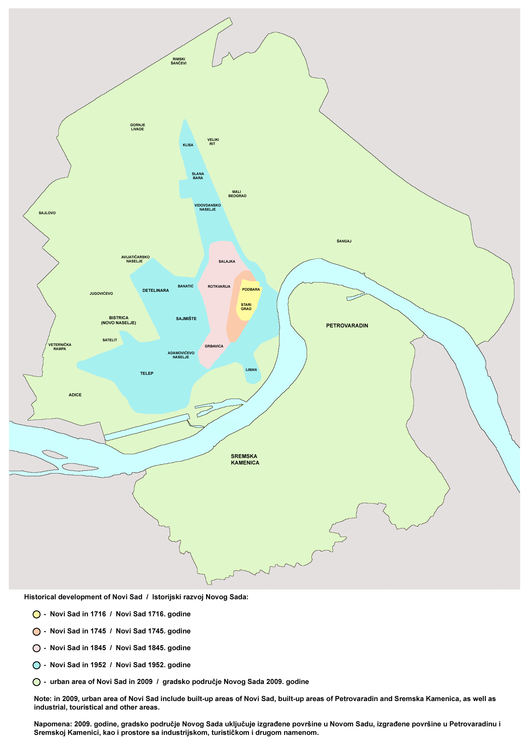 Historical development of Novi Sad, 1716-2009. Istorijski razvoj Novog Sada između 1716. i 2009. godine.